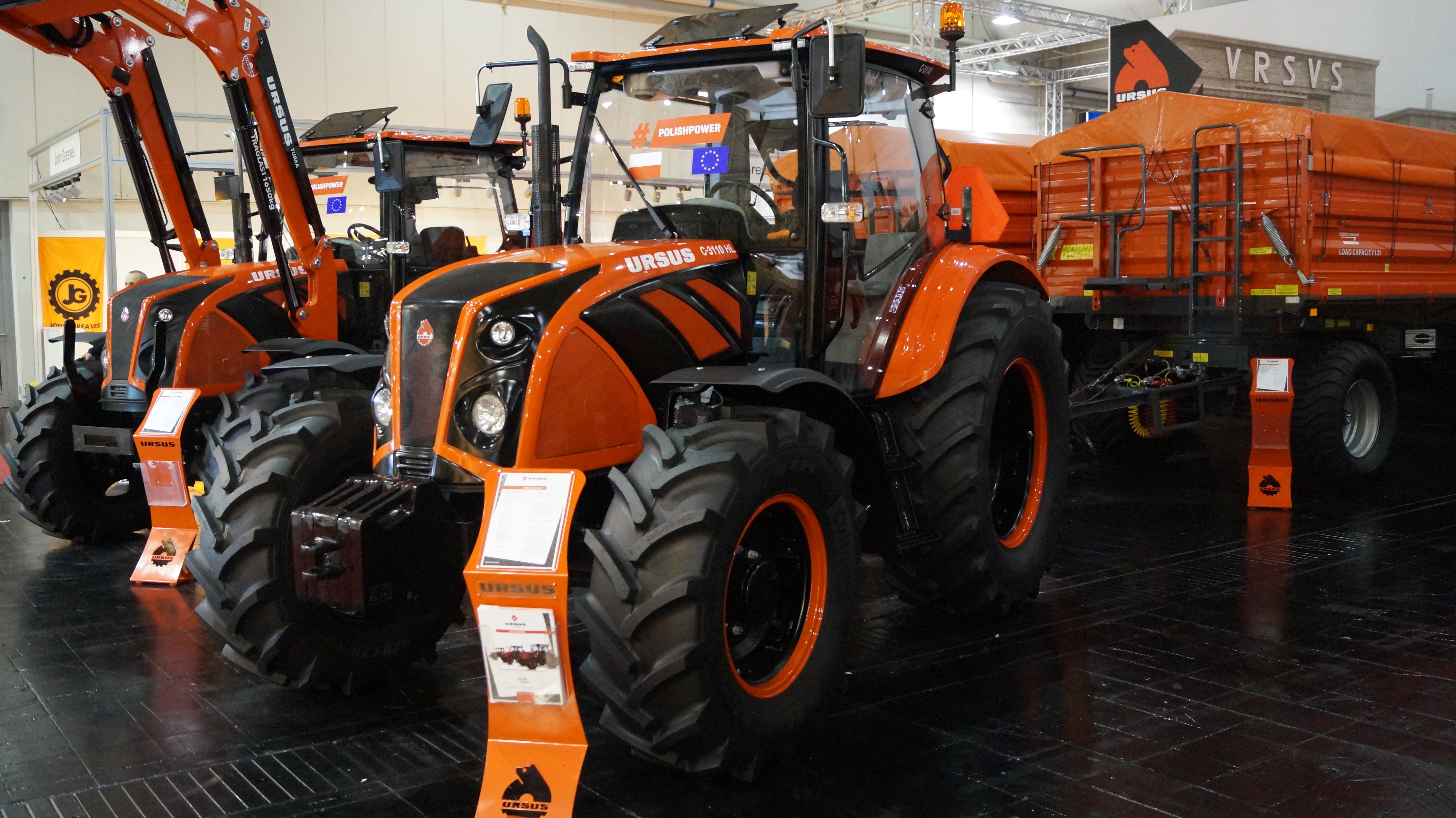 Schrägansicht der Front eines Ursus C-3110 HL, ausgestellt auf der Agritechnica 2017.